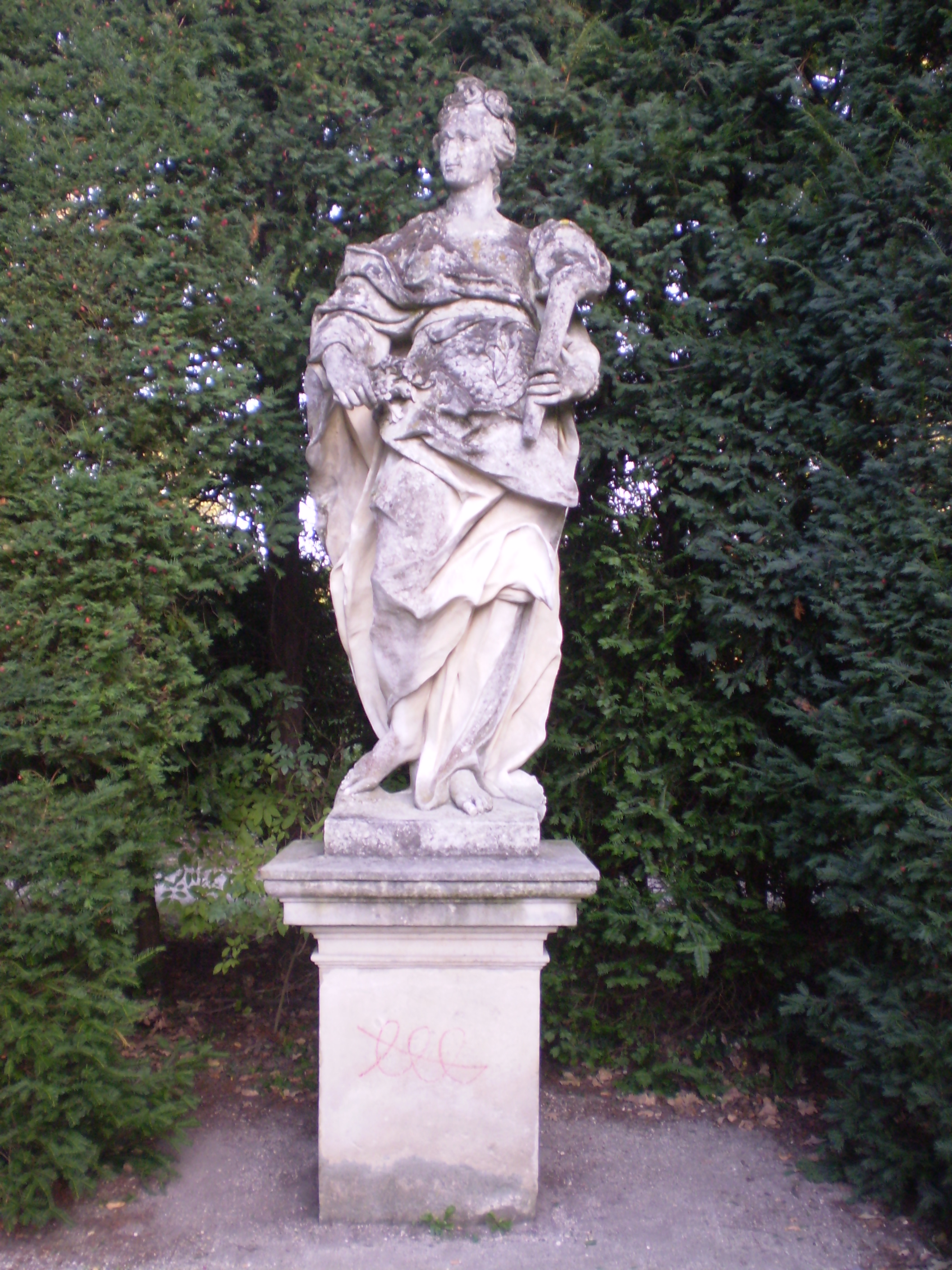 Areál Zámku Lednice.